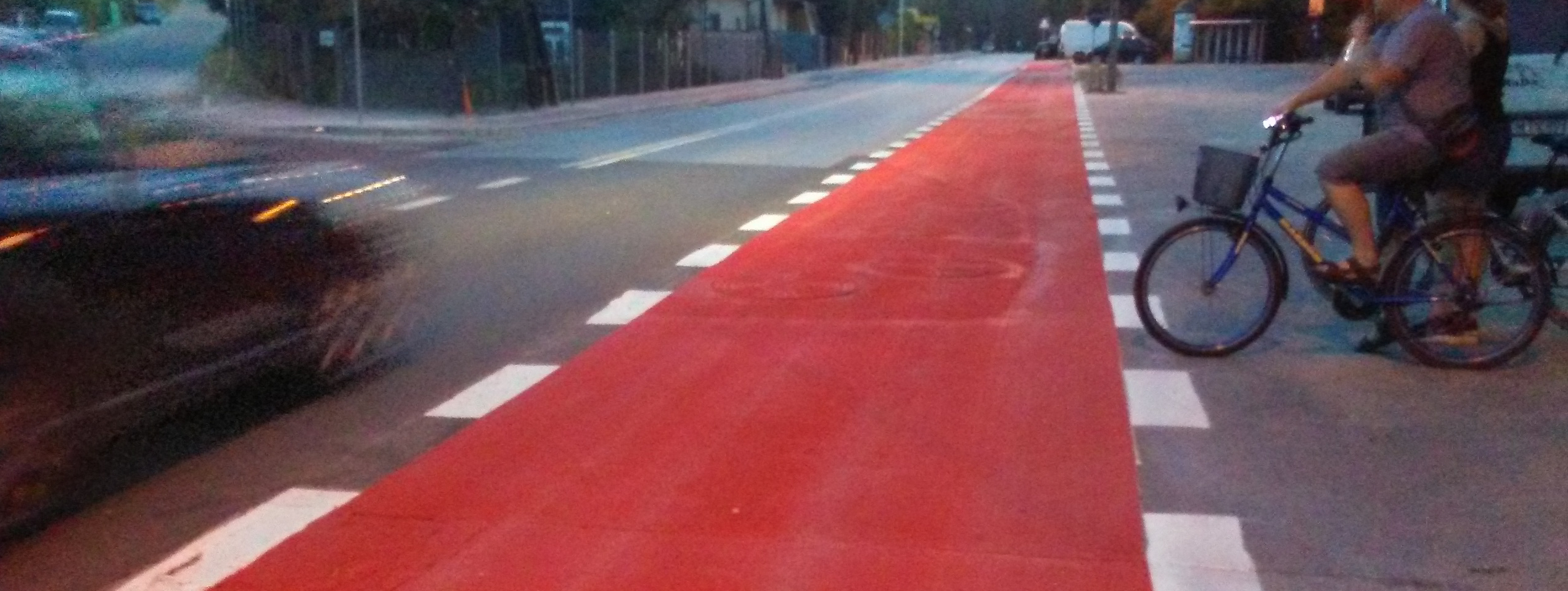 Początek ścieżki rowerowej nad Zalew Sulejowski. Ludwinów, wschodnia dzielnica Tomaszowa Mazowieckiego